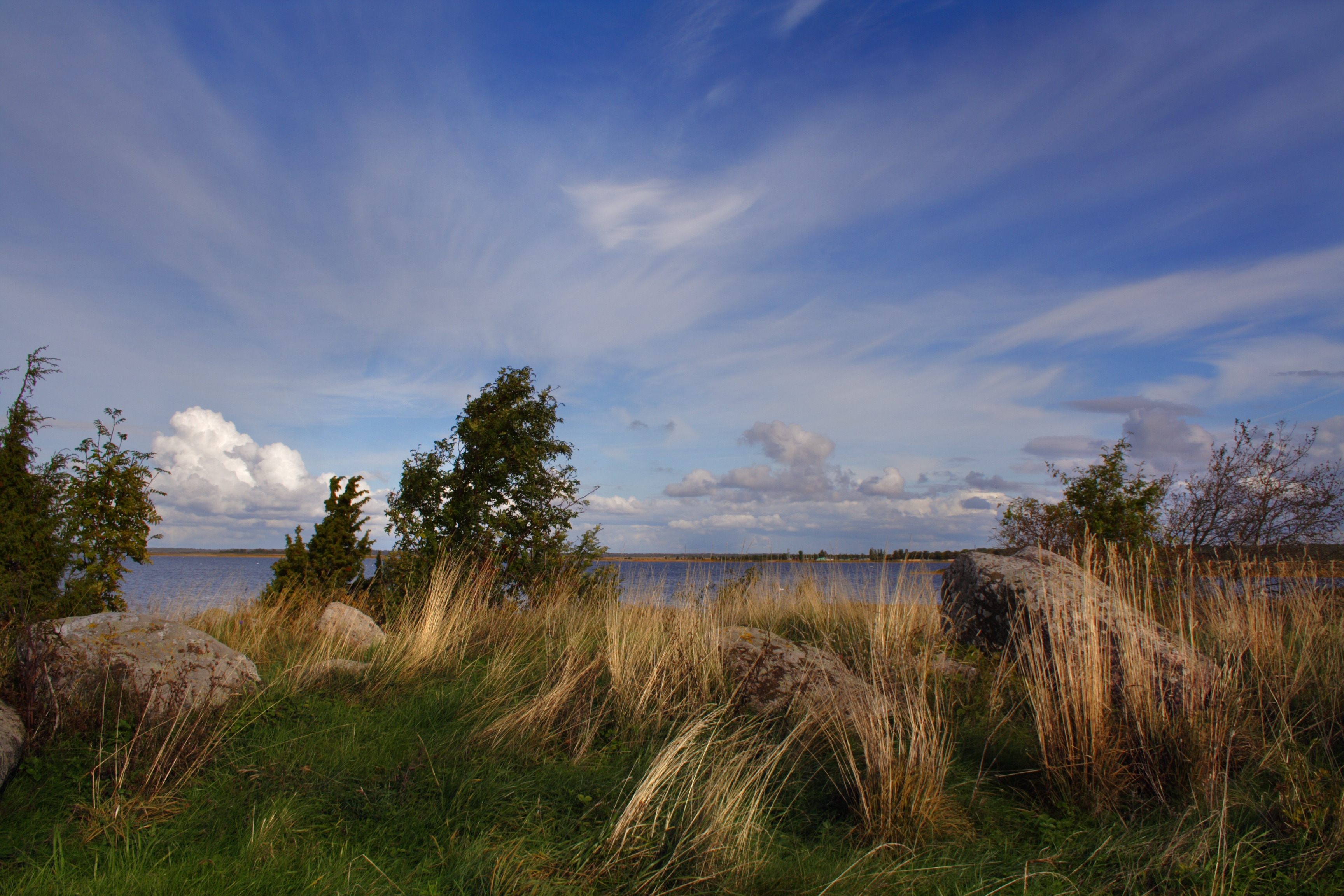 Sassi poolsaar